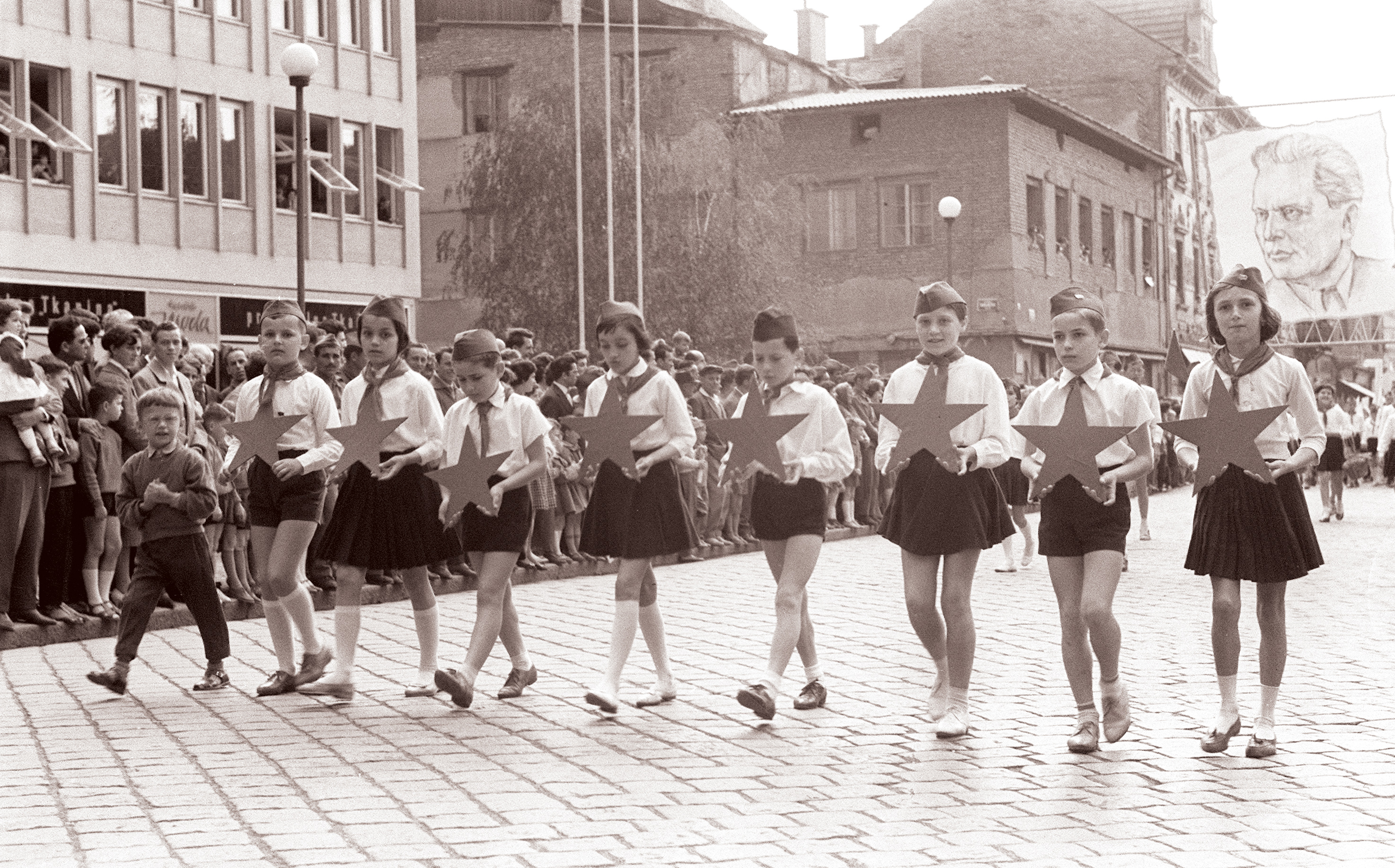 Dan mladosti v Mariboru